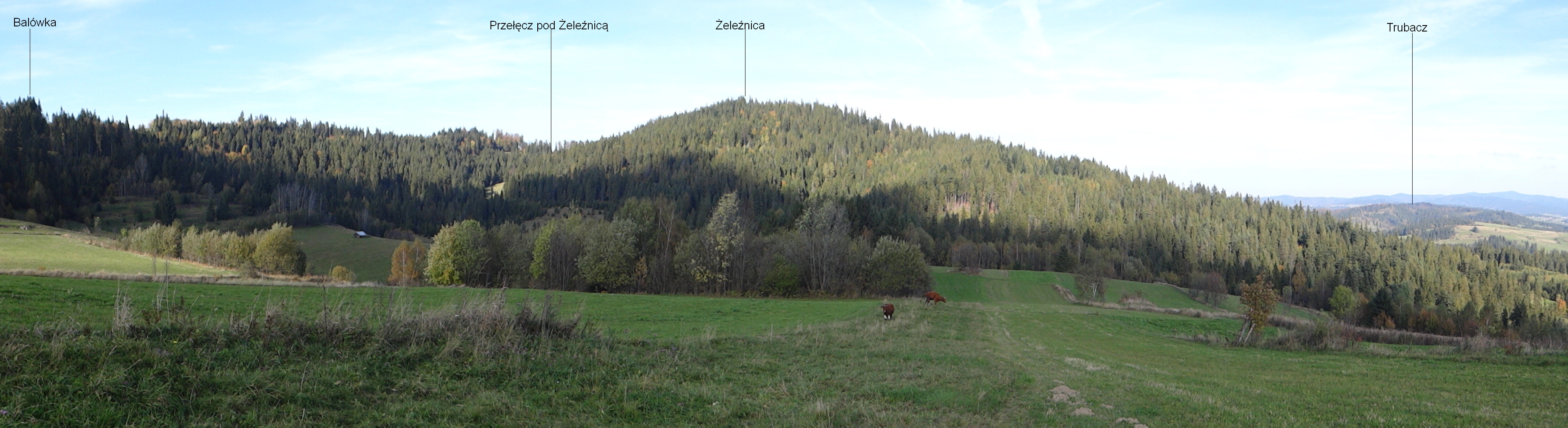 Widok od południowej strony (z górnych osiedli Odrowąża)